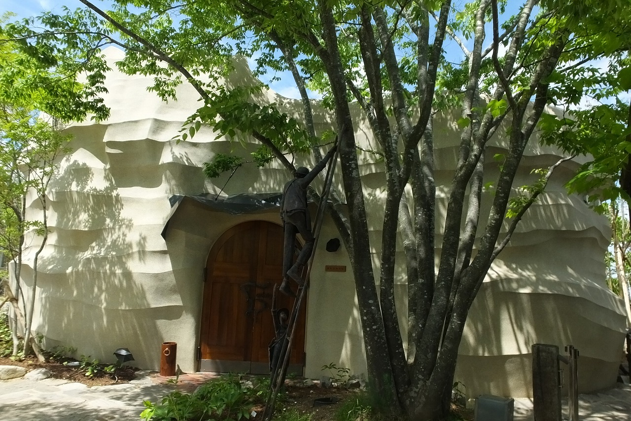 PATISSIER eS koyama - 夢先案内会社 FANTASY DIRECTOR（ファンタジー・ディレクター）久住有生作 パティシエ エス コヤマ 小山進